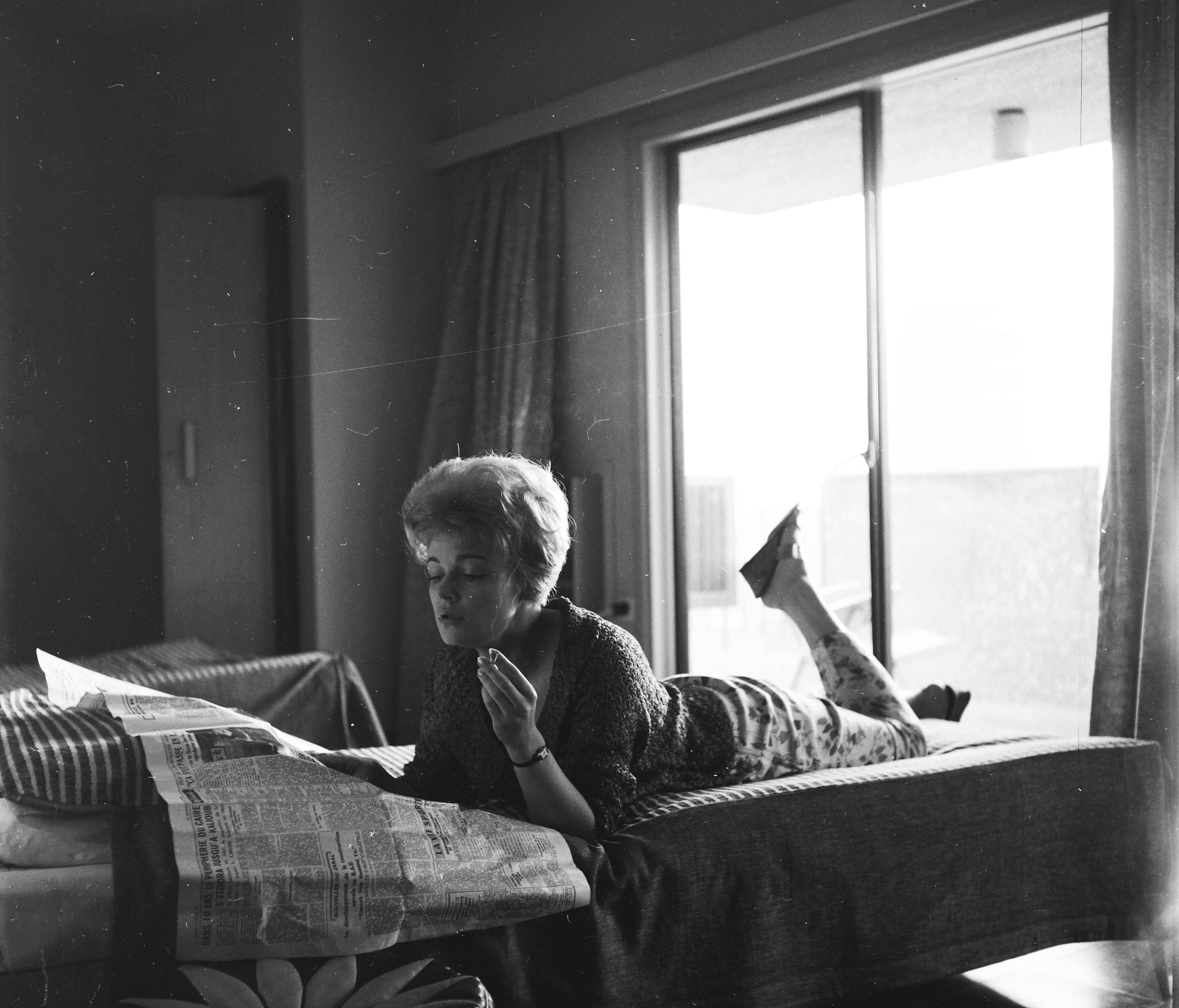 Krencsey Marianne színművésznő. A felvétel az Egyiptomi történet című film forgatása alkalmával készült. Location: Egypt Tags: celebrity, reading, newspaper, smoking Title: Krencsey Marianne színművésznő. A felvétel az Egyiptomi történet című film forgatása alkalmával készült.